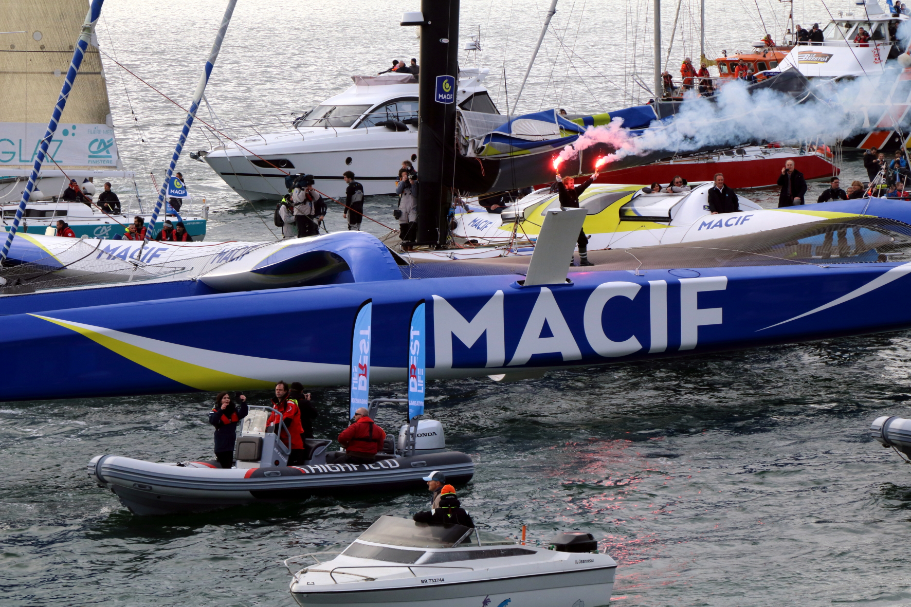 Arrivée de François Gabart à Brest le 17 décembre 2017 après son record du tour du monde en multicoque et en solitaire en 42 j 16 h 40 min 35 s.